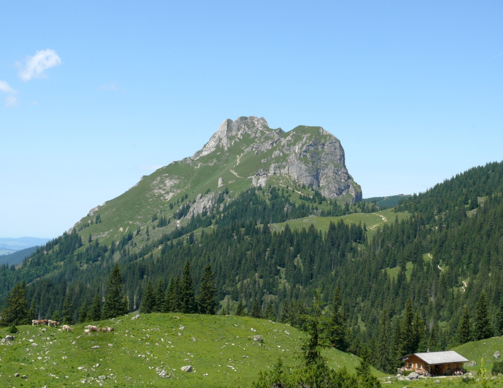 Blick von der Sebenalp zum Aggenstein